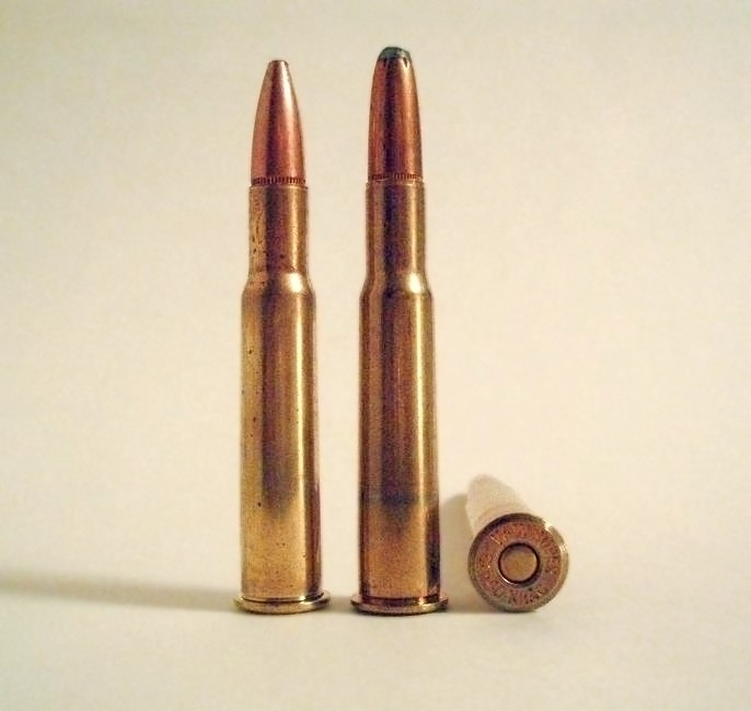 .30-40 Krag cartridges